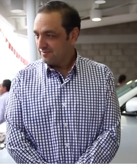 Presentador colombiano Jorge Alfredo Vargas